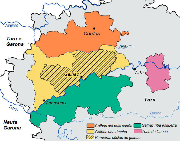 Mapa del AOC del galhac